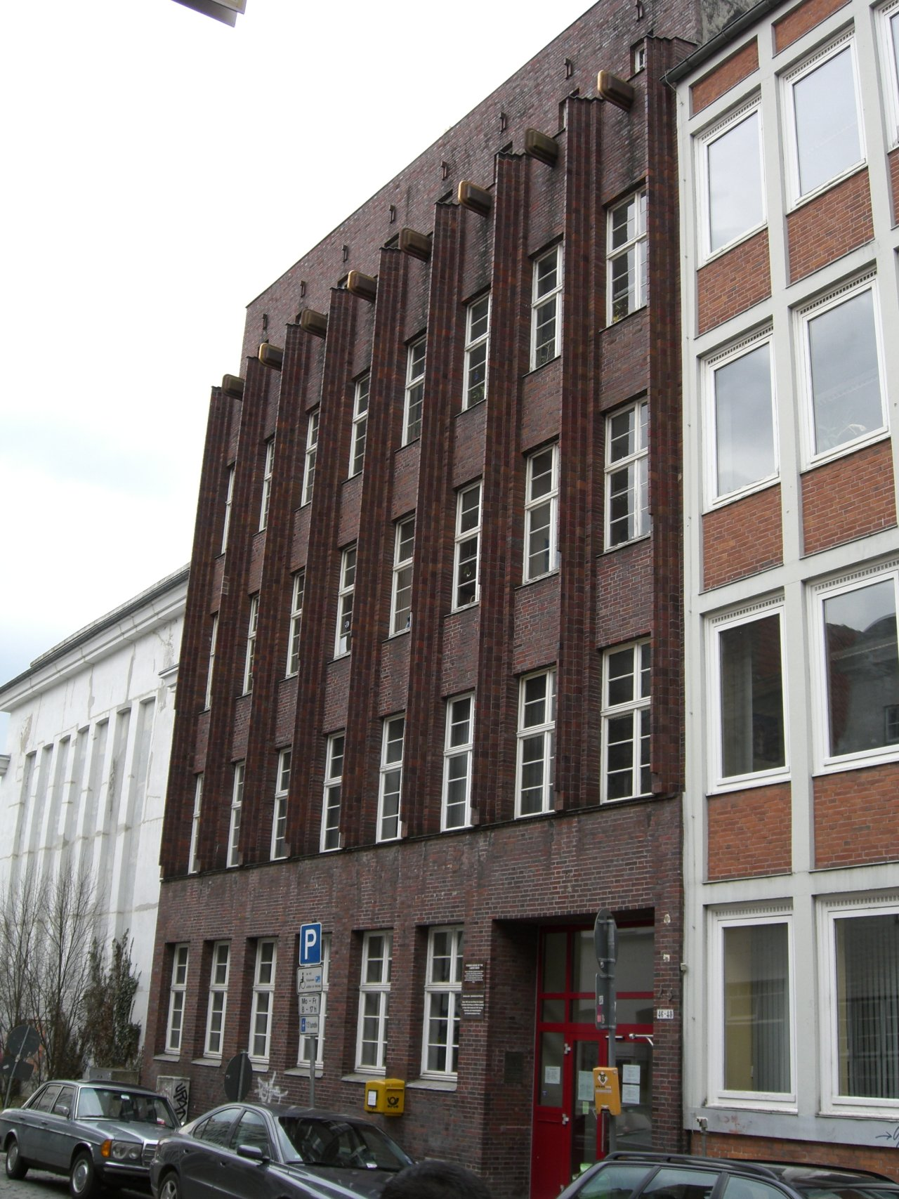 Gewerkschaftshaus Lübeck (eigene Aufnahme)